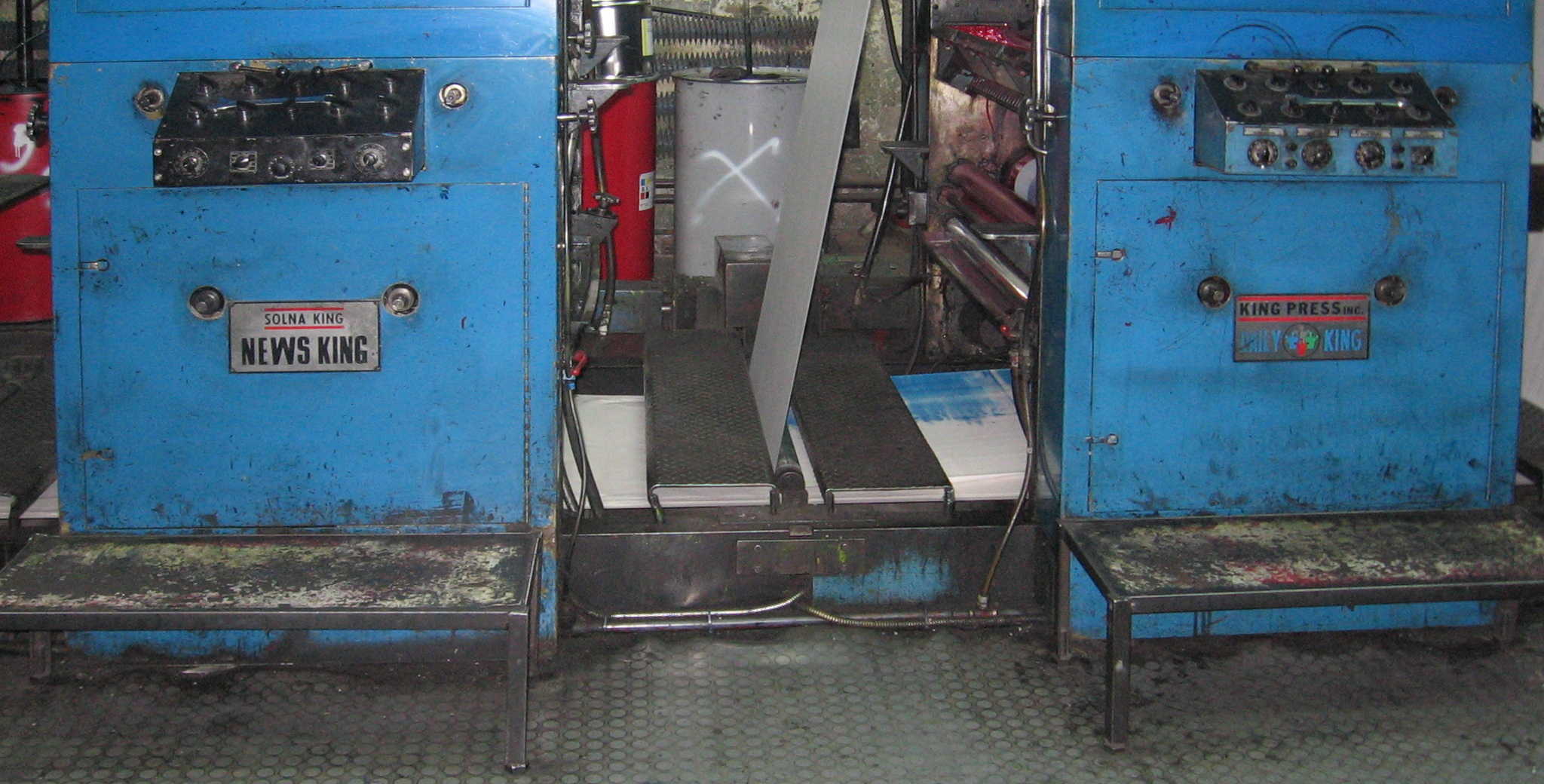 wieże drukujące małej rolowej maszyny offsetowej: z lewej wieża Solna-King, z prawej King-Press